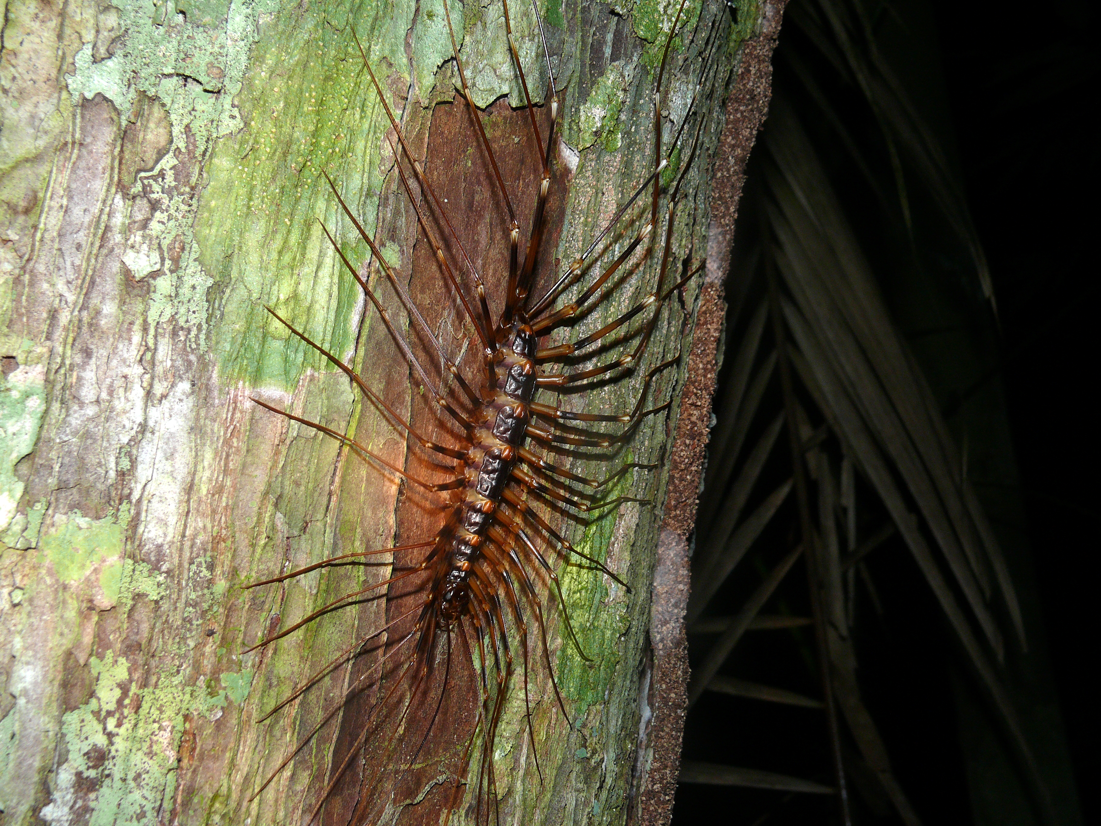 Similajau NP, Sarawak, MALAYSIA